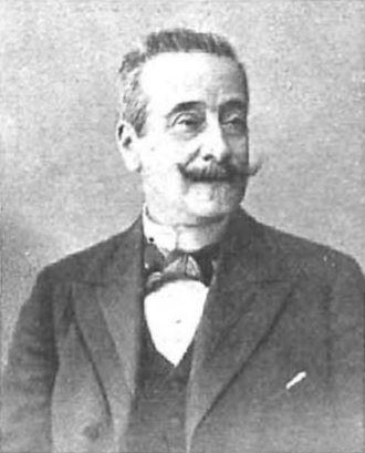 Retrato de Ramón Nocedal, fotografía de Manuel Compañy recogida en la revista española Nuevo Mundo.